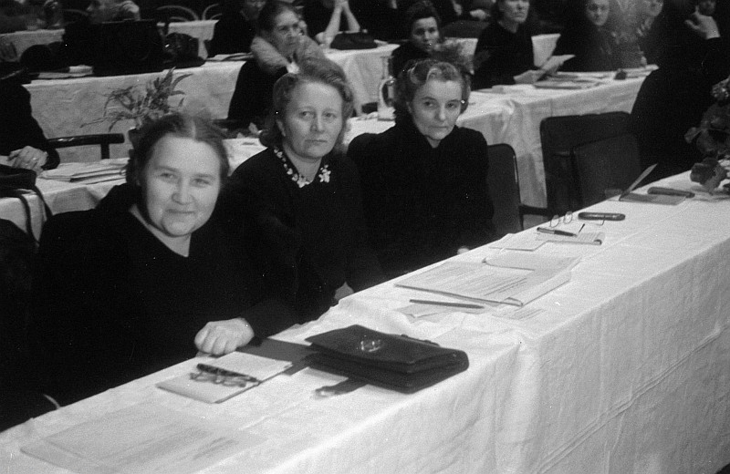 Original image description from the Deutsche FotothekGreta Kuckhoff, Haber (München), Dr. Barbara v. Renthe (Berlin)